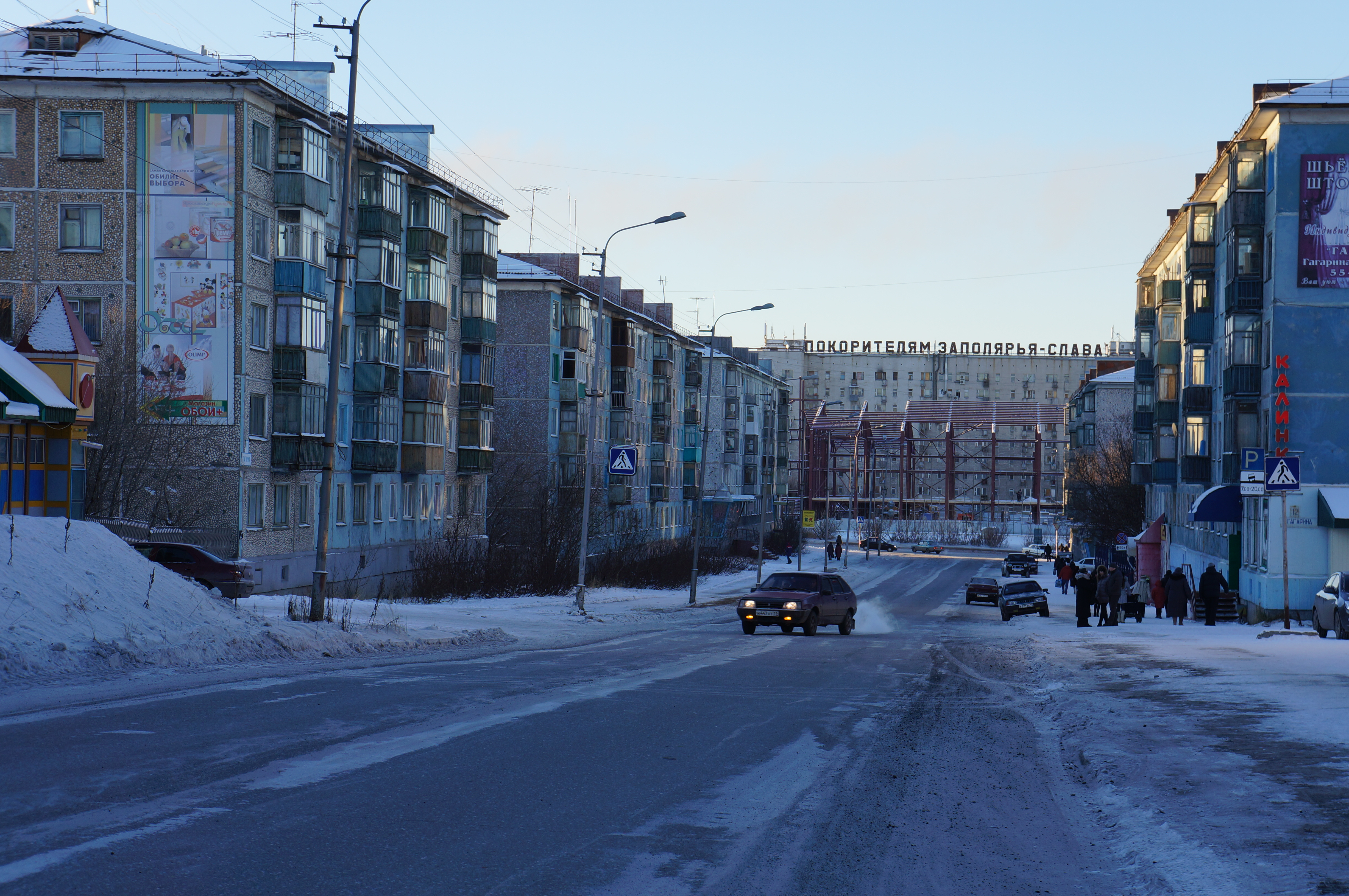 ул. Гагарина